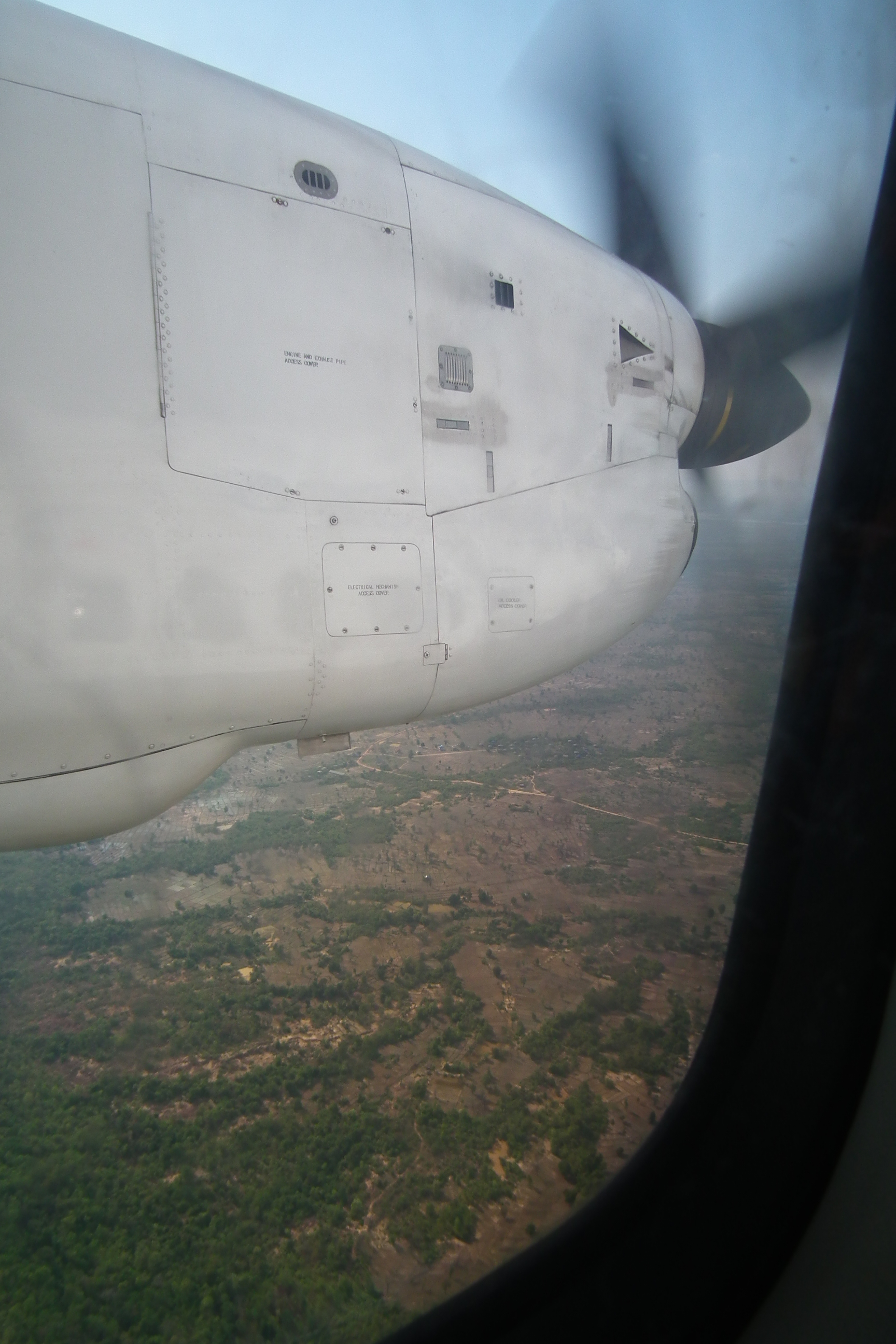 Xian MA60(RDPL-34168),Lao Airlines ラオス航空 QV523 Siem Reap International Airport, Xian MA60(RDPL-34168), Lao Airlines QV523